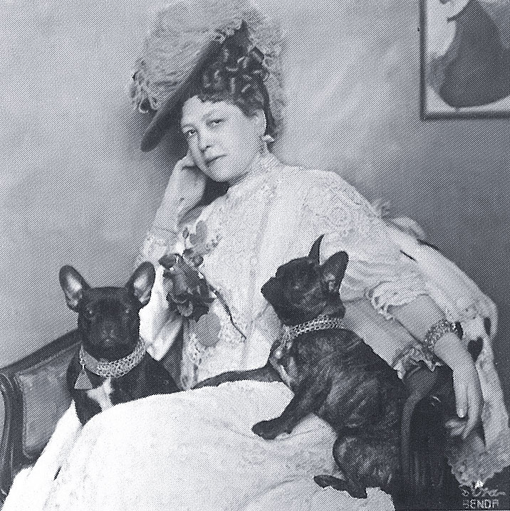 Anna Maria Sacher, Photographie um 1908